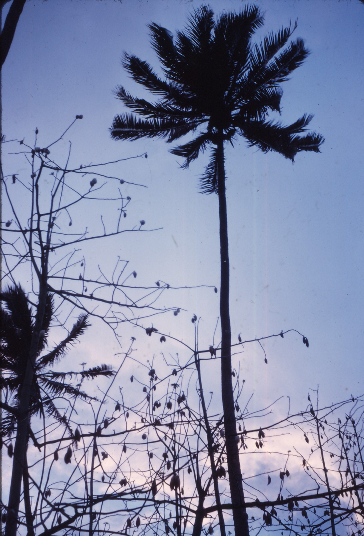 Vanilliers suspendus aux cocotiers sur l'île de Tahaa